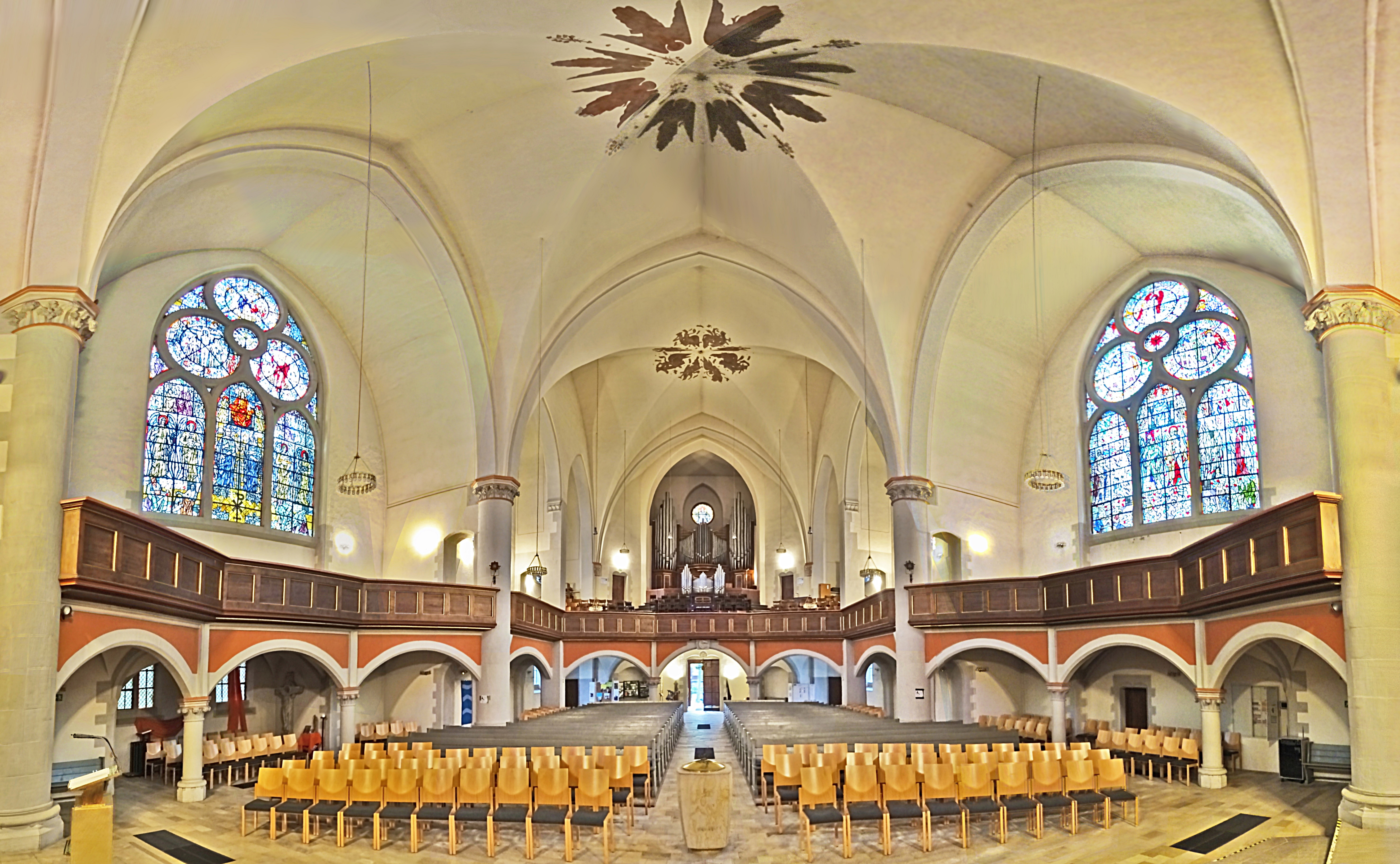 Innenraum-Panorama Thomaskirche (Erfurt)